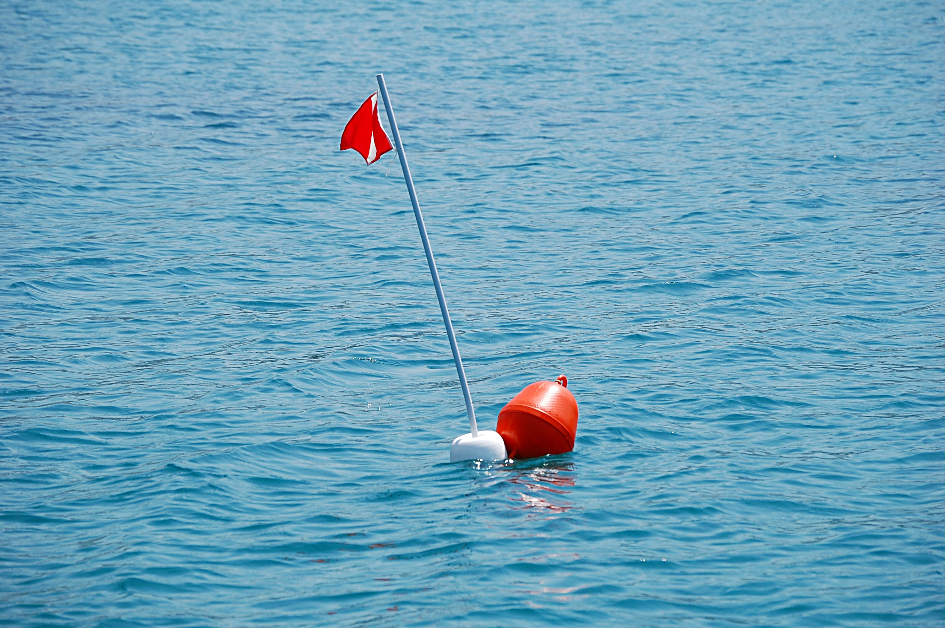 Boa fotografata nel mare di Sapri